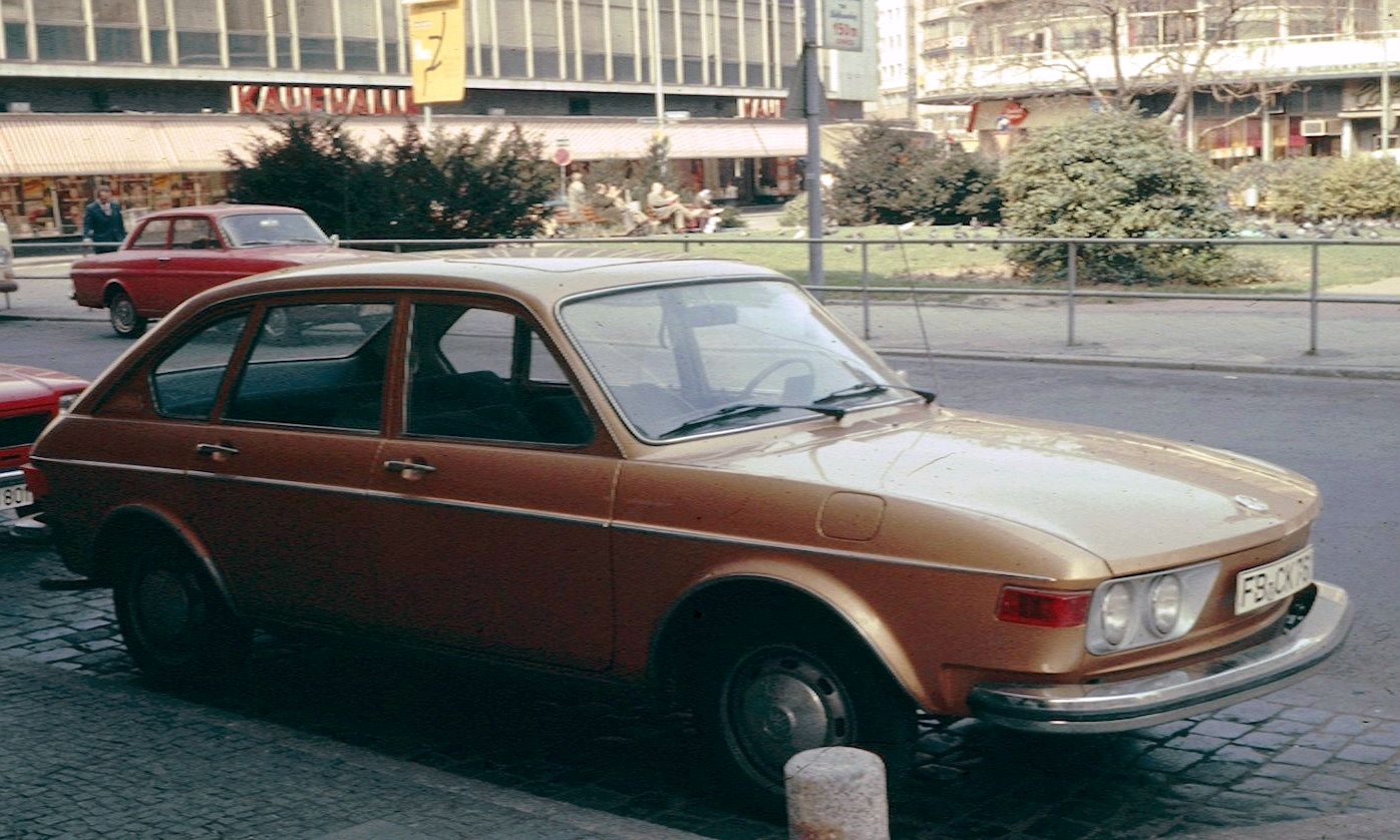 Volkswagen 412 Sedan Frankfurt am Main 1971